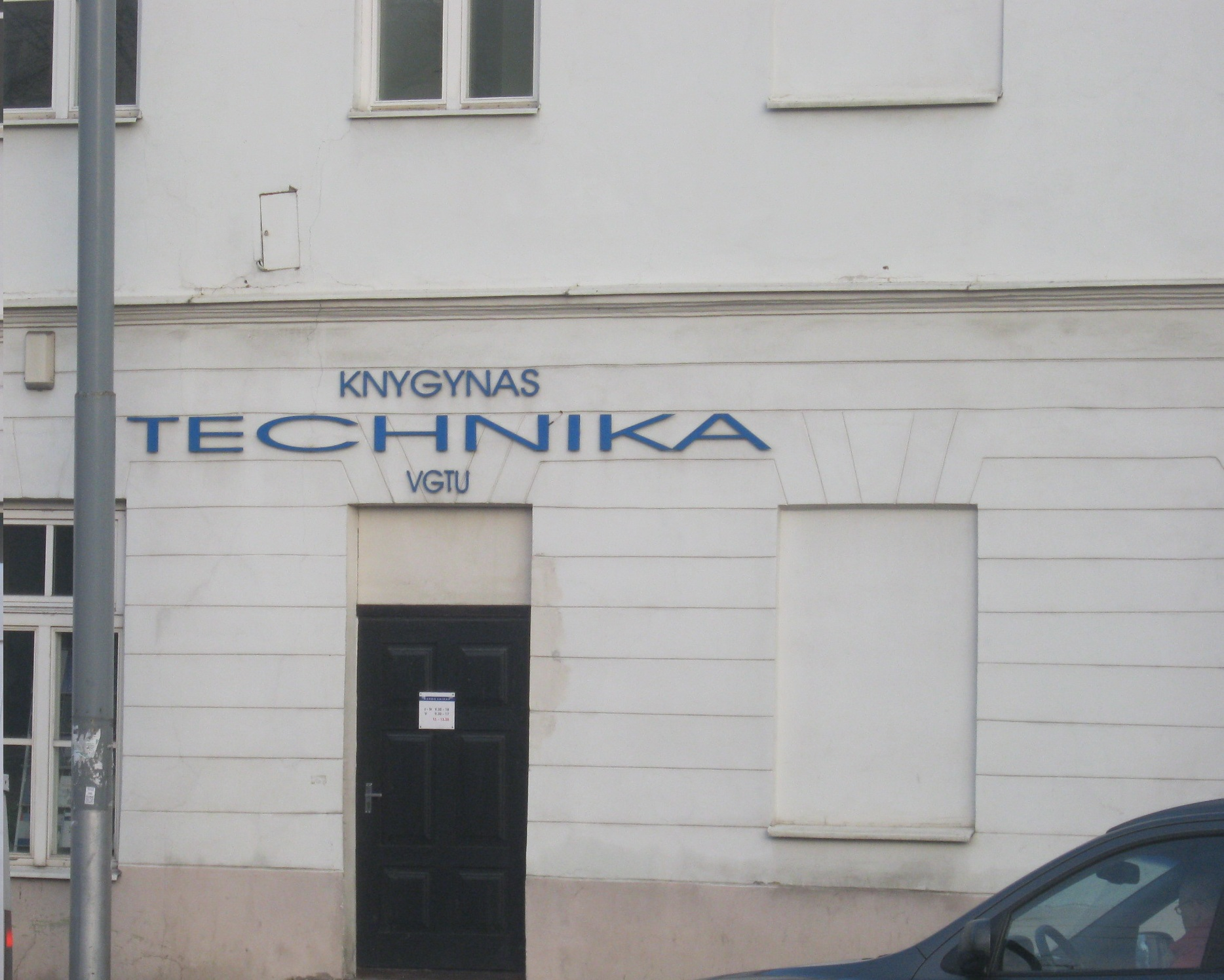 Knygynas "Technika"